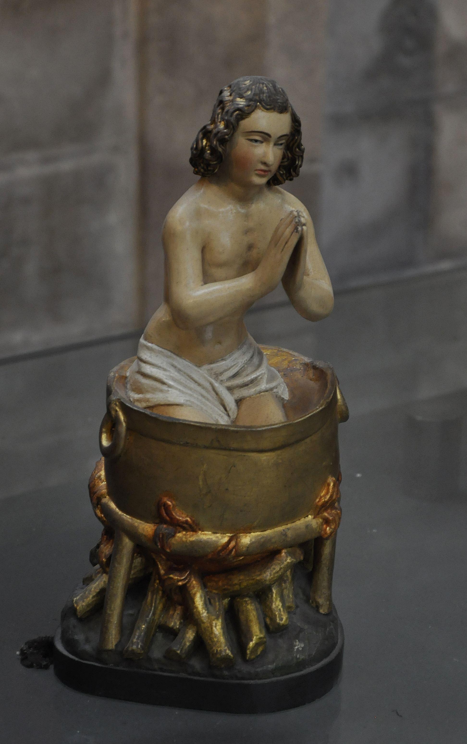 Sint-Jan-in-de-olie (atelier Jan Borreman 15e eeuw) Leuven Sint-Pieterskerk 23-11-2013 This photo of movable heritage has been taken in the Flemish Region